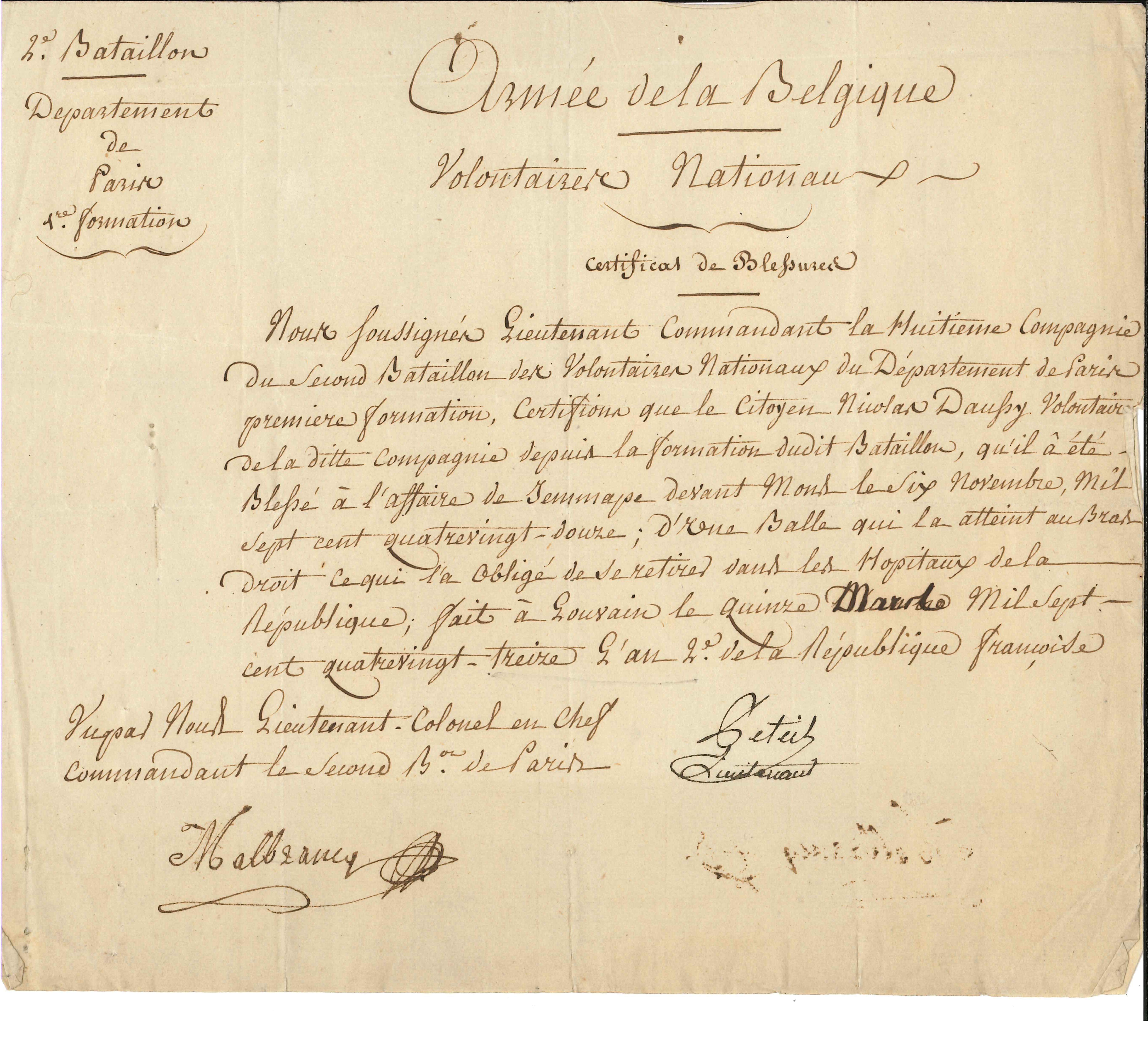 Certificat de Blessures de Nicolas Daussy (20 août 1769 – 24 novembre 1794), volontaire au 2e bataillon de volontaires de Paris, signé par le Lieutenant-Colonel en Chef Malbrancq. Nicolas Daussy était l'oncle de l’académicien Pierre Daussy. "Nous soussignés Lieutenant Commandant la Huitième Compagnie du Second Bataillon des Volontaires Nationaux du Département de Paris premiere formation, certifions que le citoyen Nicolas Daussy volontaire de la ditte compagnie depuis la formation du dit Bataillon, qu’il â été blessé à l’affaire de Jemmape [Jemappes] devant Mons le six novembre, mil sept cent quatrevingt-douze ; d’une balle qui la atteint au bras droit ce qui l’a obligé de se retirer dans les hopitaux de la République ; fait à Louvain le quinze mars mil sept cent quatrevingt-treize l’an 2e de la République Française."